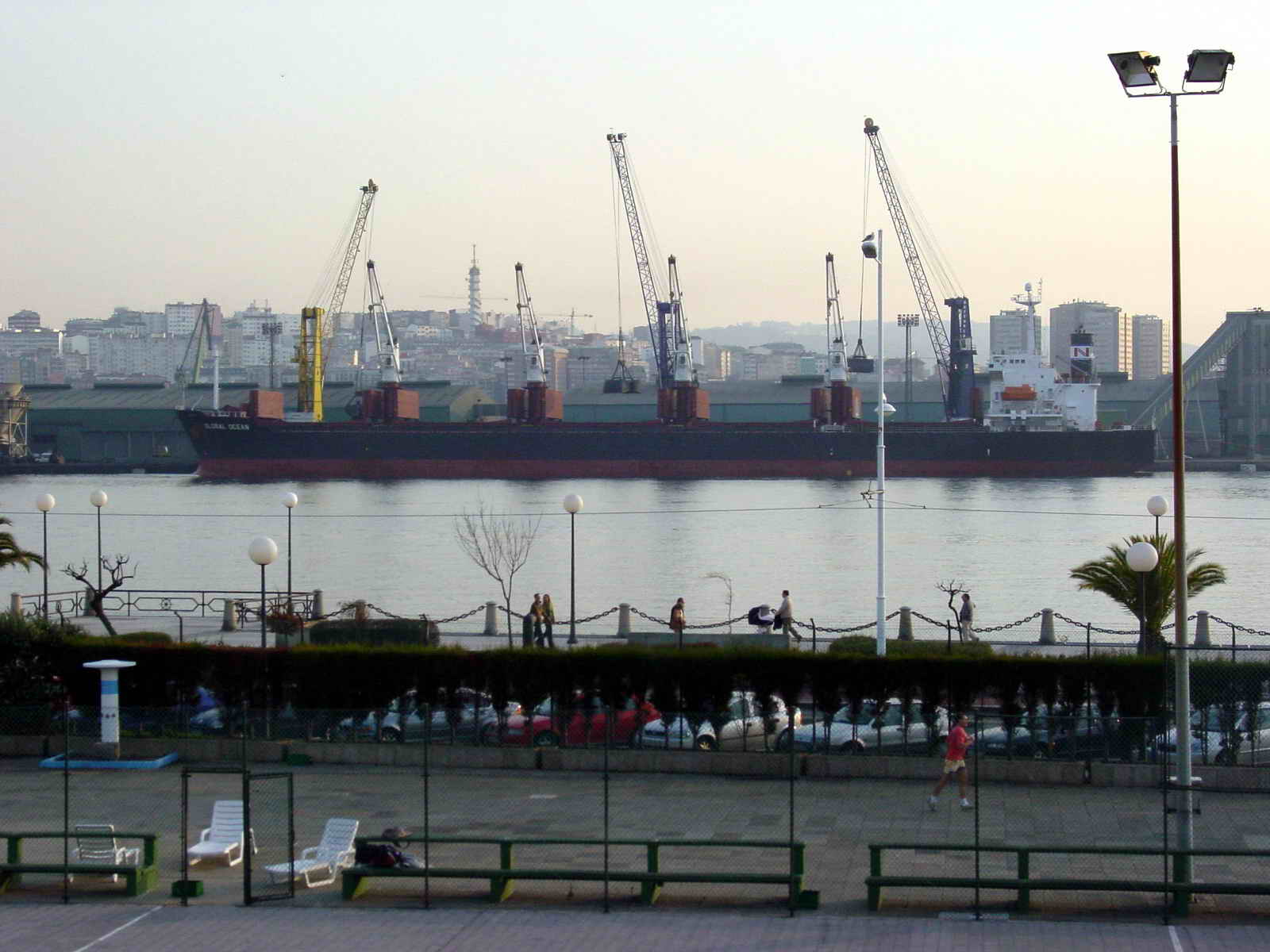 A Coruña - Galicia - Spain